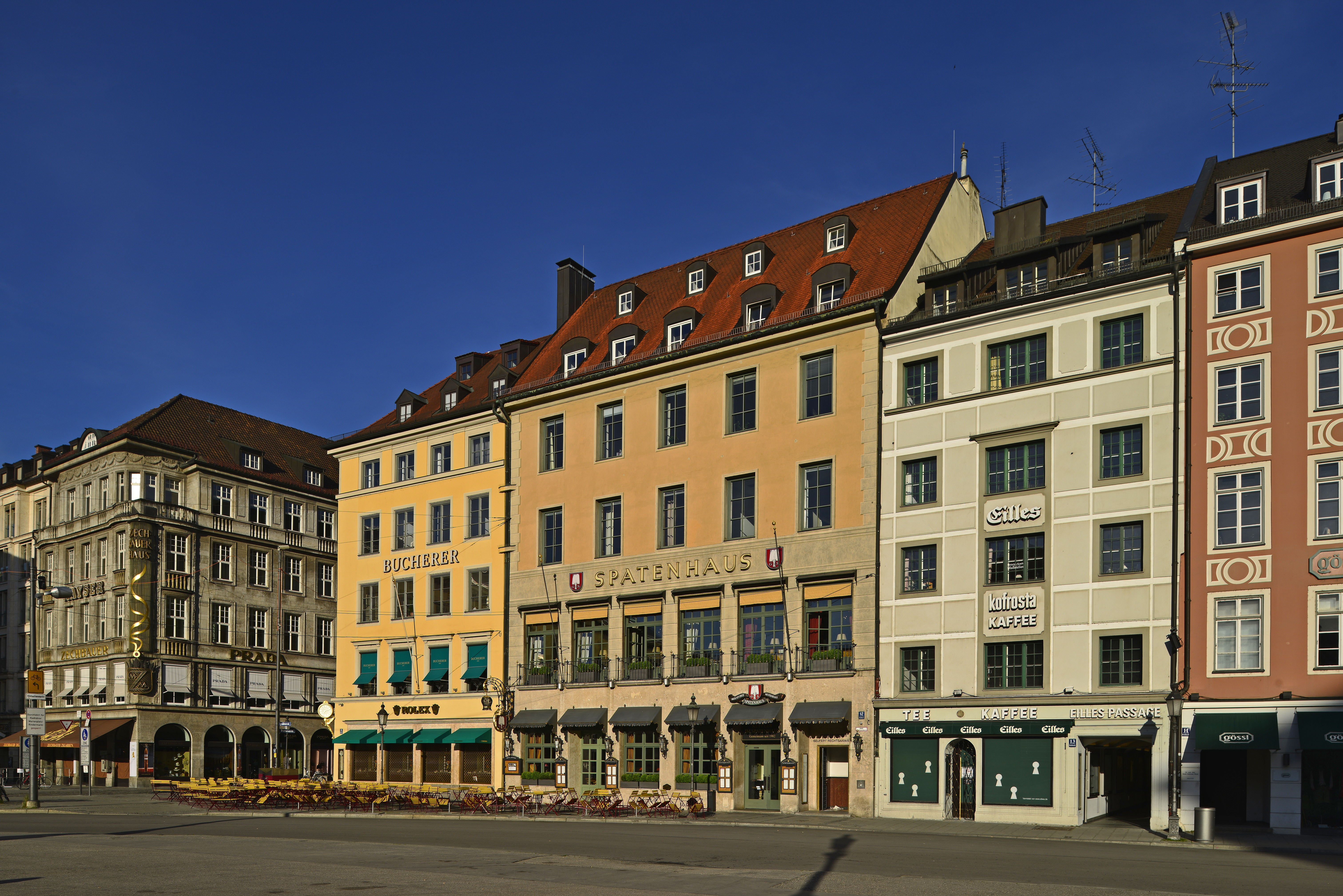 München, Fassadenansicht der Gebäude gegenüber dem Max-Joseph-Platz, sie bilden ab der Perusastraße die Residenzstraße nach rechts mit den Hausnummern 11,12 und 13. Die Perusastraße und die Hausnummern 11 und 12 waren einst Teile des Pittrich (Bittrich) Frauenklosters. Die Perusastraße wurde mit dem Abbruch der Klosteranlage im Jahr 1806 geschaffen.